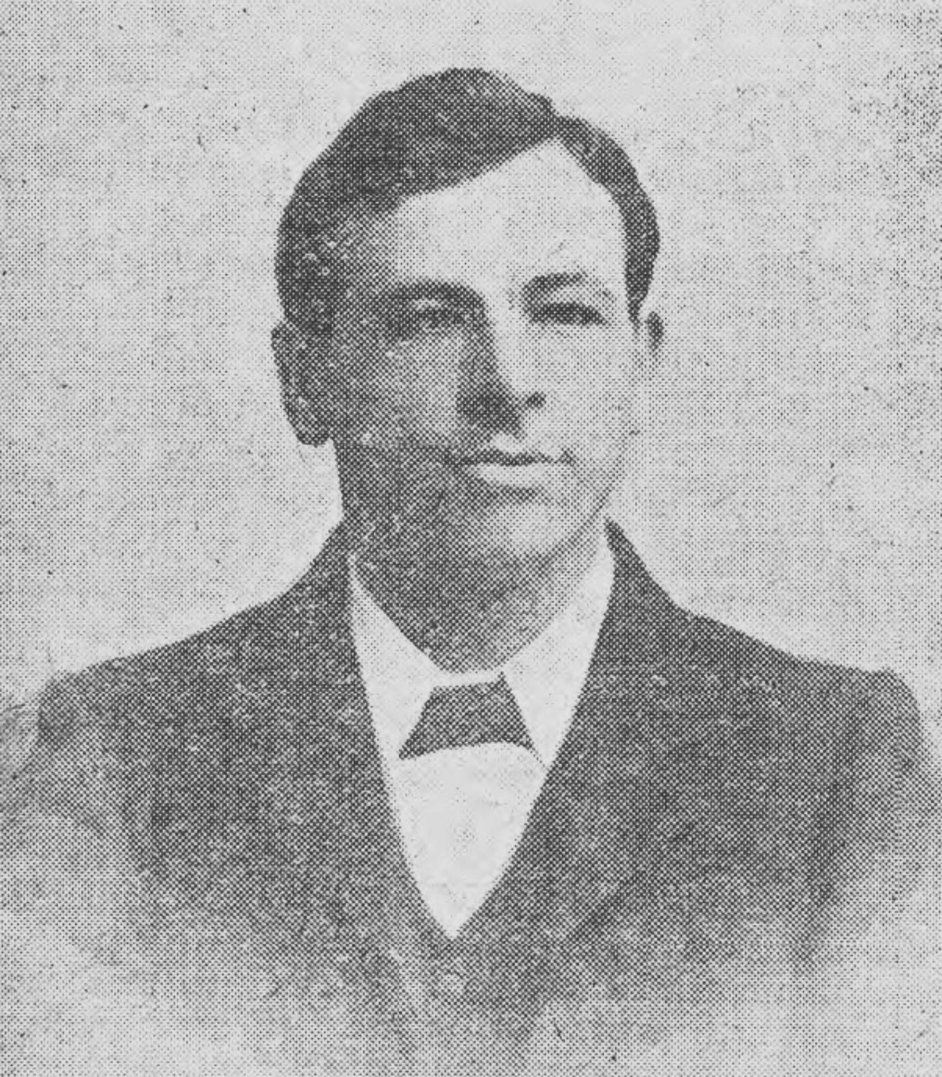 Parch John Owen, yr Archdderwydd Dyfnallt